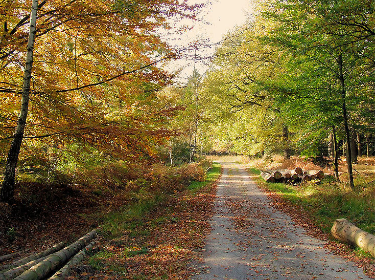 Herbstlicher Hertogenwald bei Eupen Belgien, ehemalige Trasse einer Schmalspurbahn aus dem 1. Weltkrieg